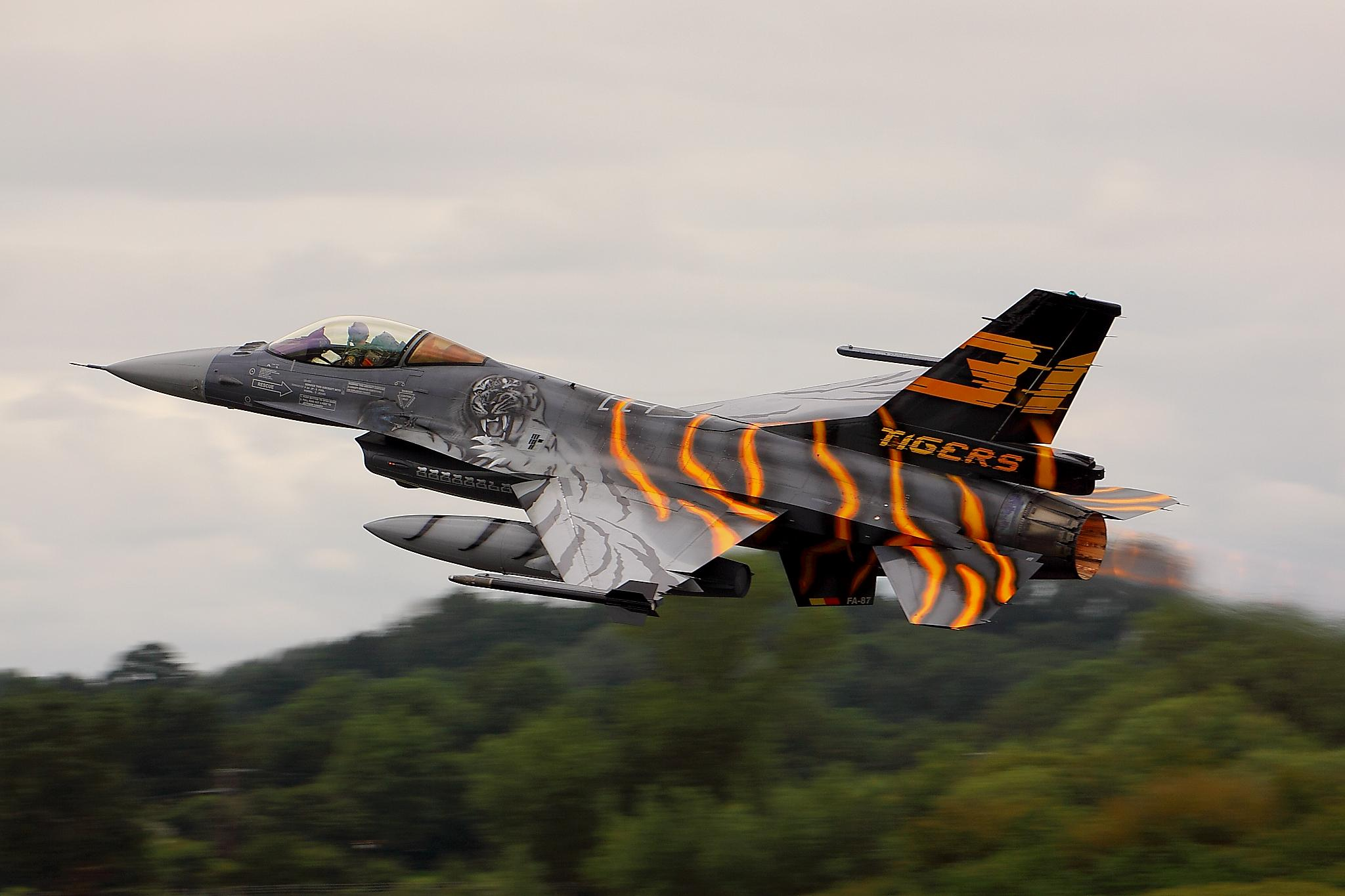 F16 - RIAT 2012